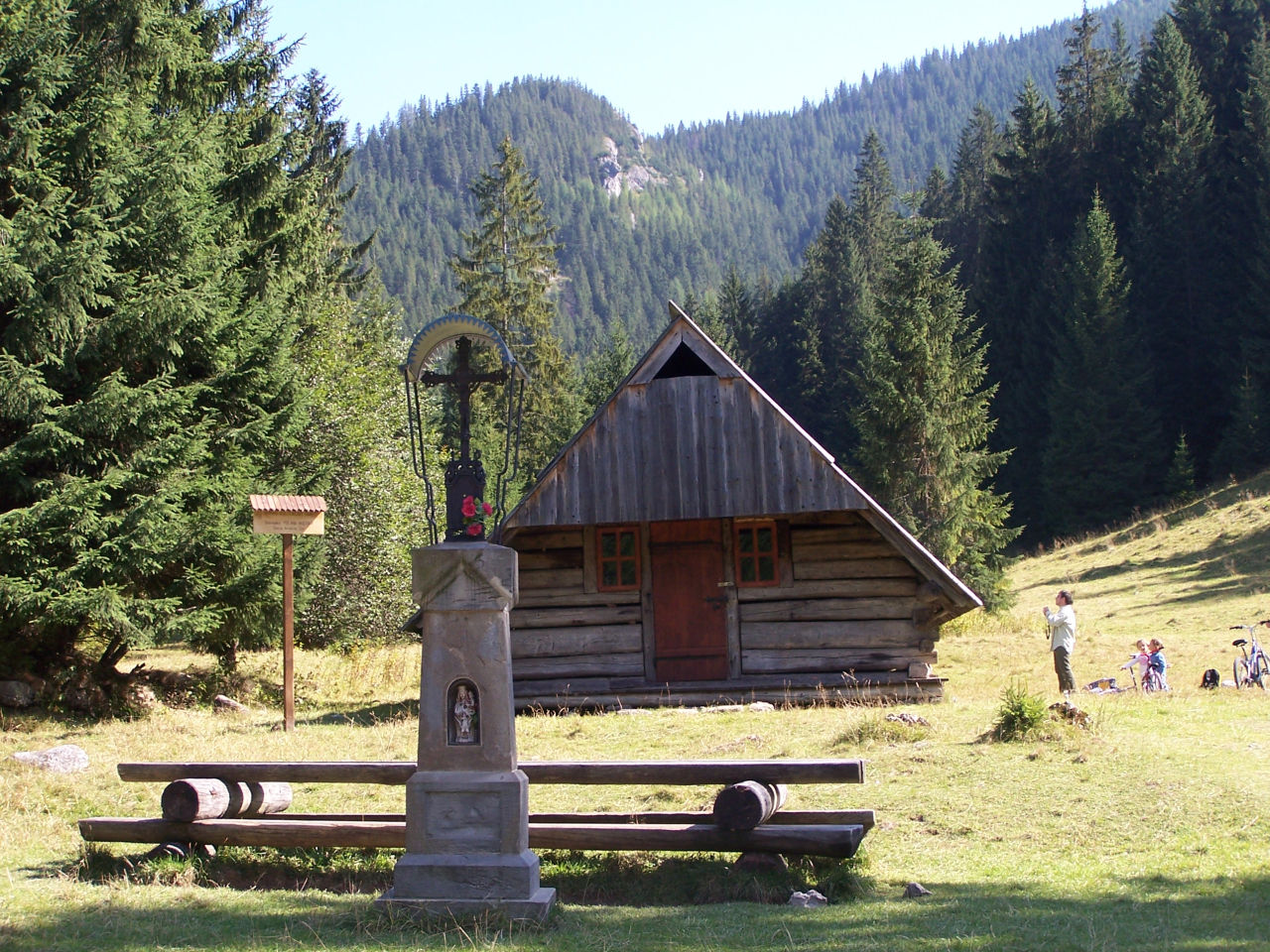 Polana Huciska (Dolina Chochołowska, Tatry). U góry wznoszą się Kobyle Głowy